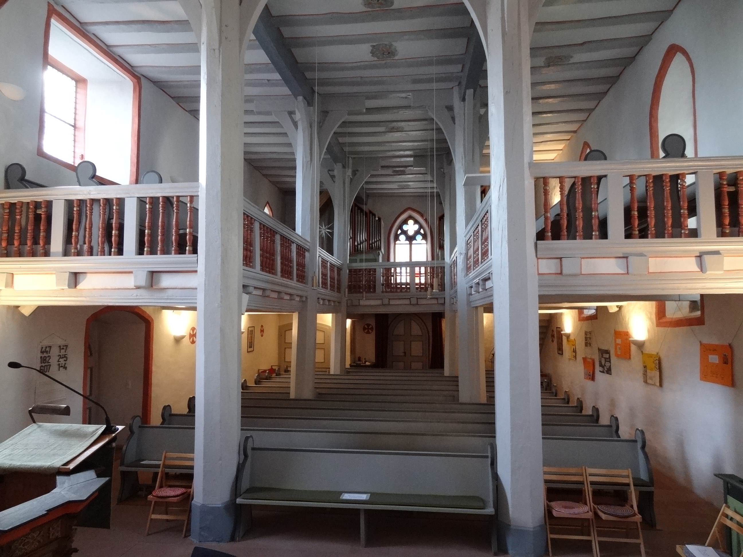 Margarethenkirche (Krofdorf)